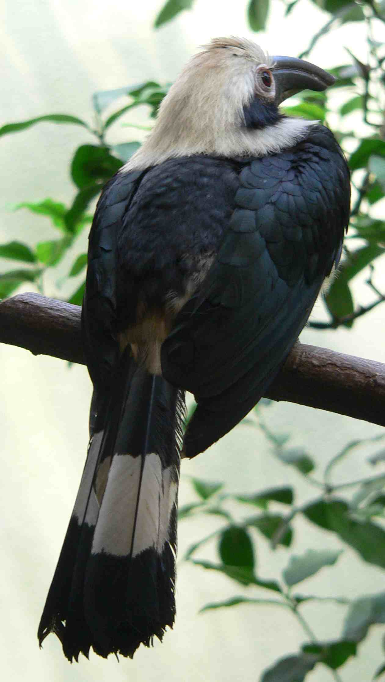 Polillo Tarictic Hornbill, Penelopides manillae subnigra